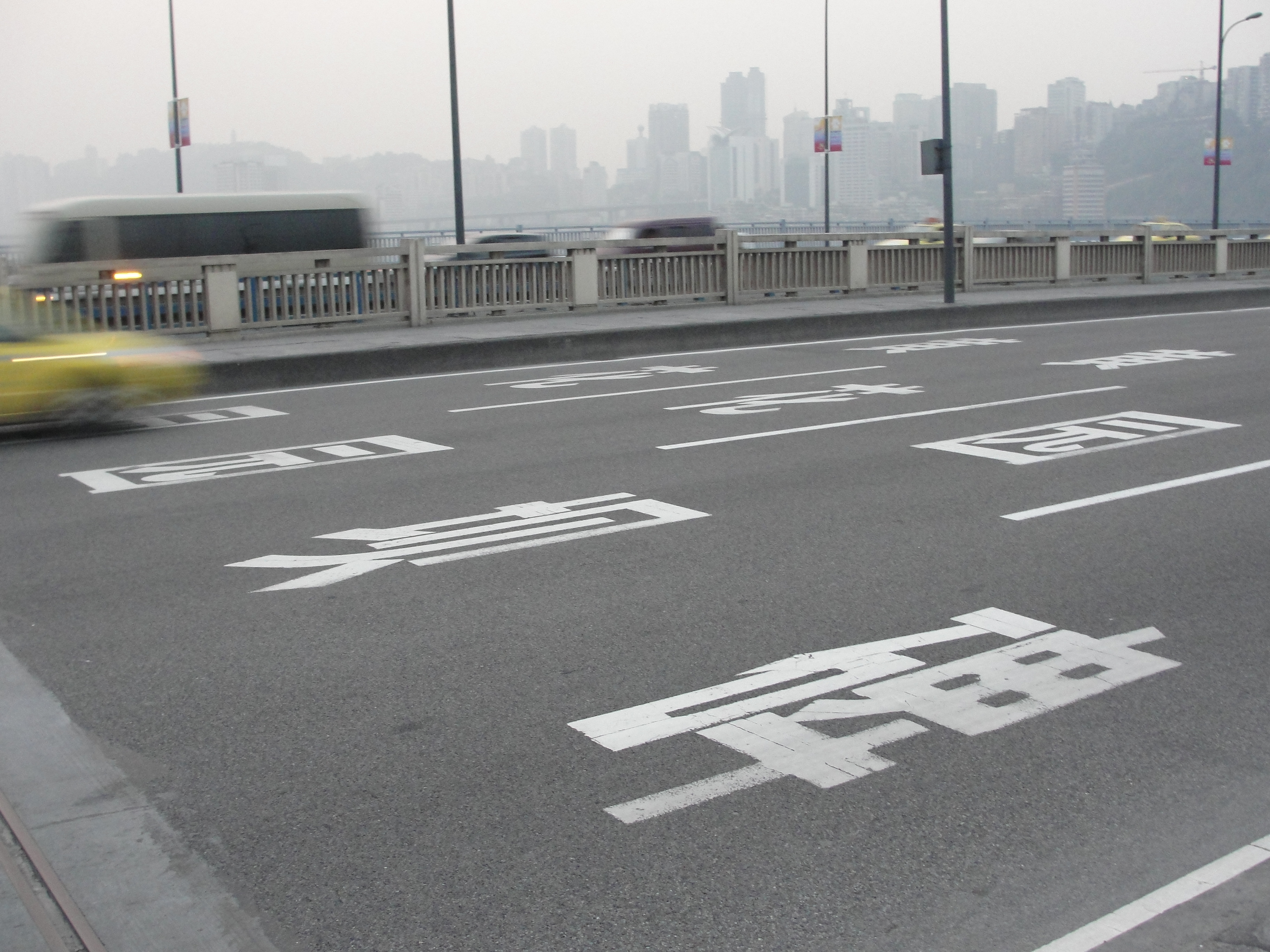 北向车流全部集中在老桥上，而南向车流则全部集中在复线桥上